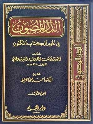 كتاب في علوم القرآن الكريم